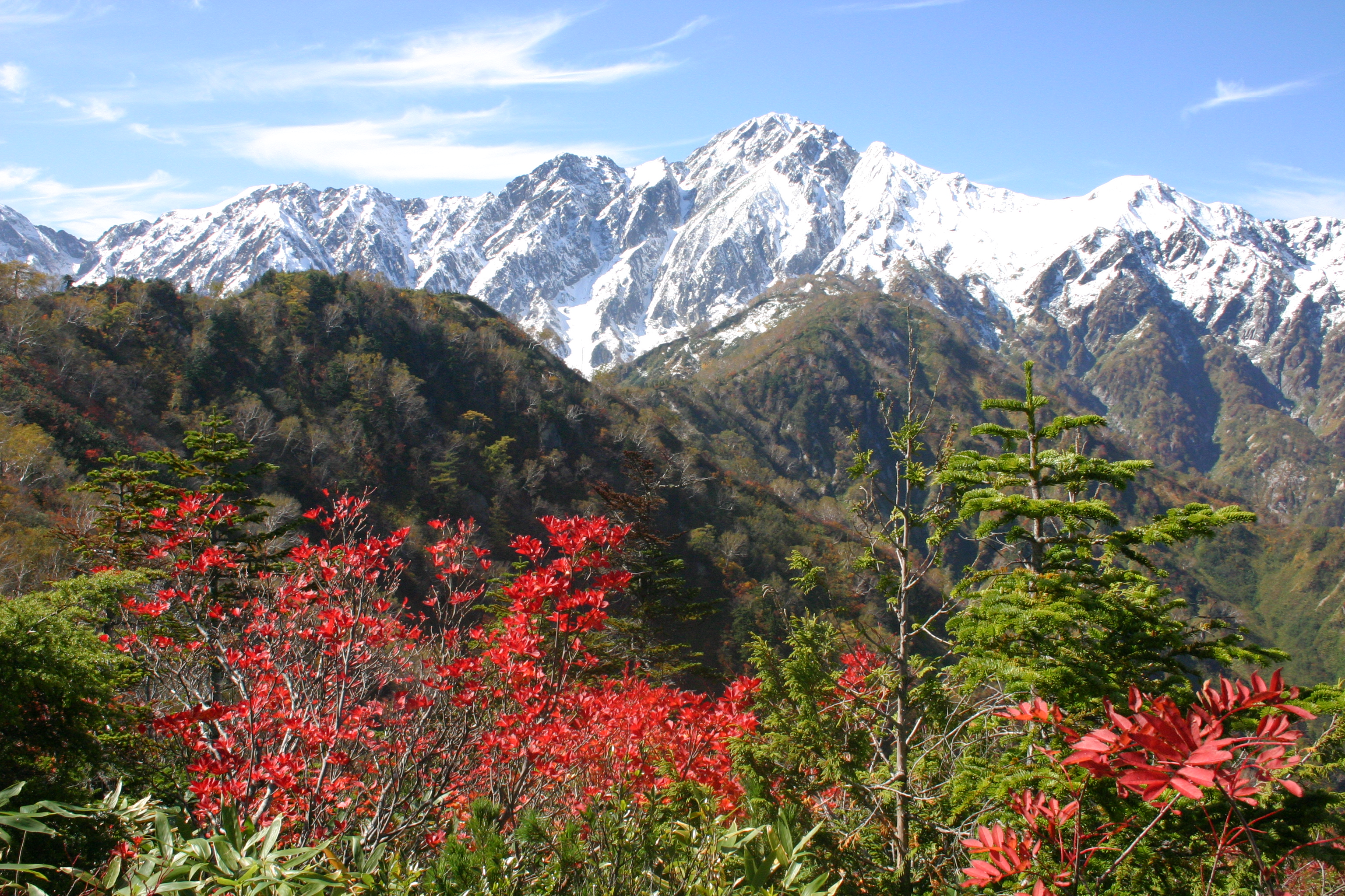 五竜岳。小遠見山より撮影